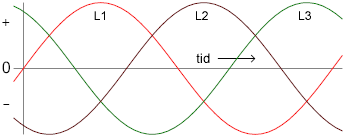 3 sinuskurver forskudt 120 grader i forhold til hinanden langs x-aksen (tiden)